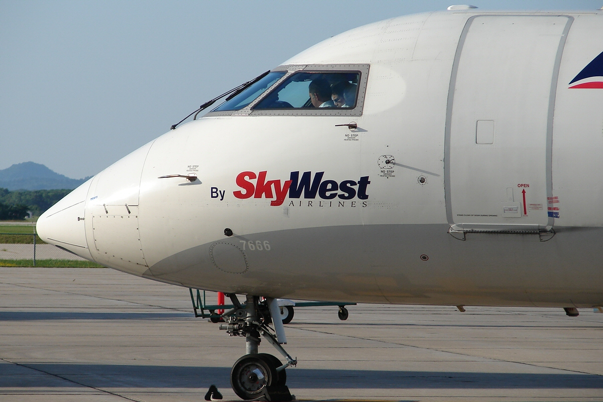 SkyWest CRJ